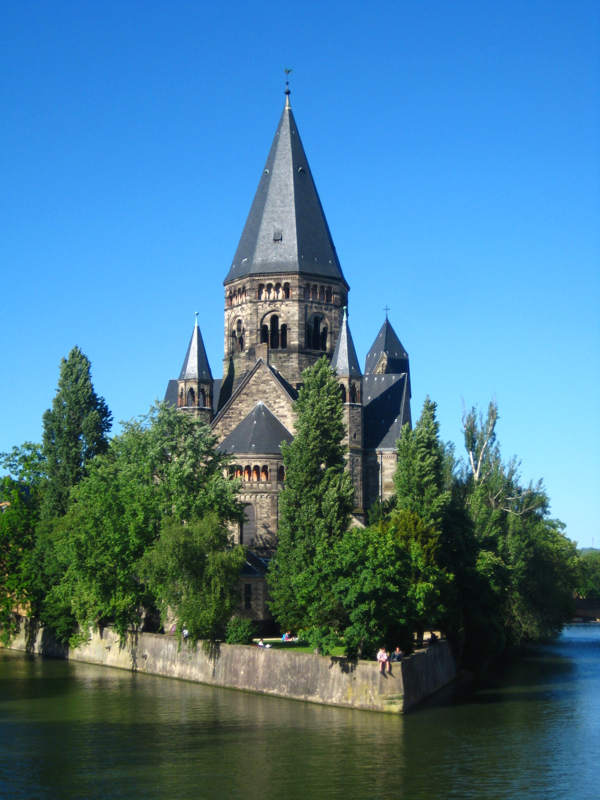 Description Temple neuf de Metz Date22 May 2009Sourcemon appareil photoAuthorAimelaime Temple neuf de Metz